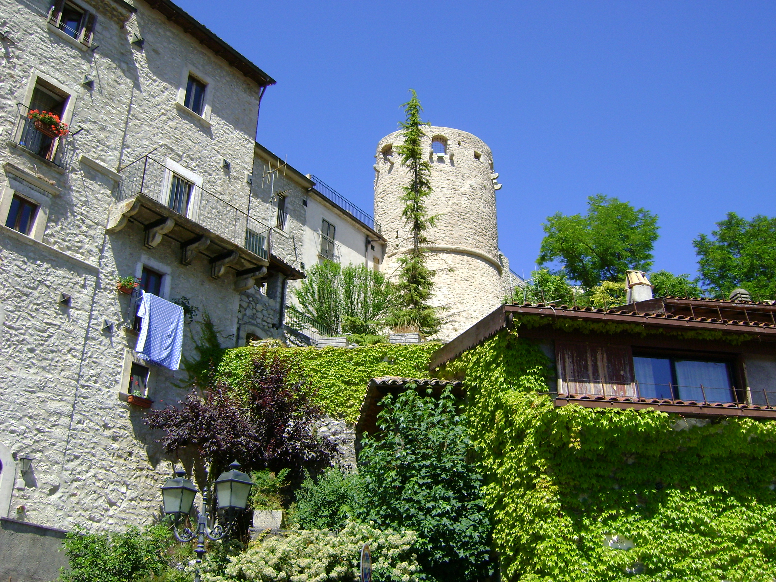 Torrione del castello di Barrea, L'Aquila.